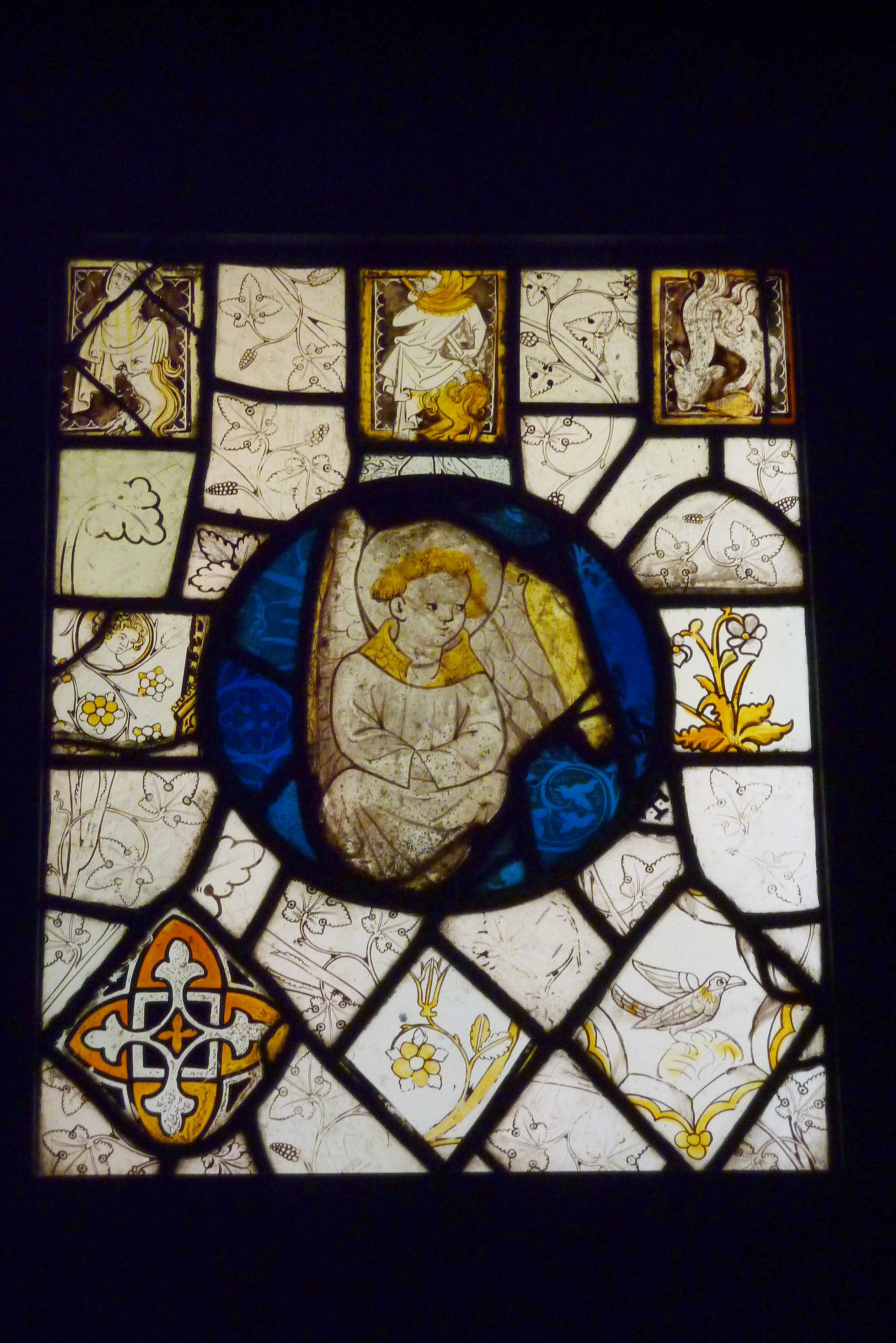 Bleiglasfenster (Fragmente) im Musée National du Moyen Âge (Hôtel de Cluny) in Paris; Herkunft: Normandie (?), Anfang 14. Jahrhundert; Grisaille und Silberlot; Darstellung: Grotesken